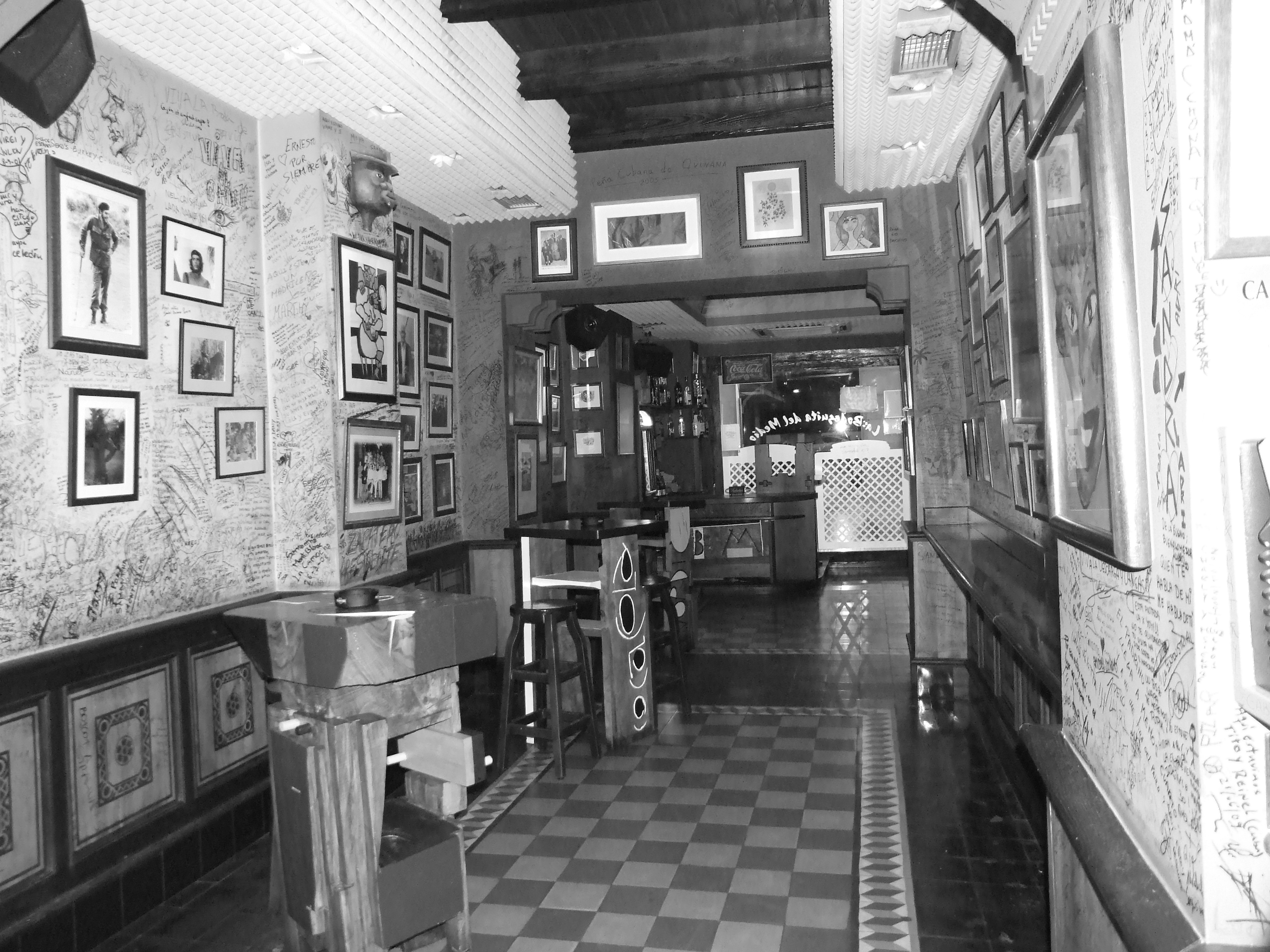 la bodeguita del medio. Post-Revolution.